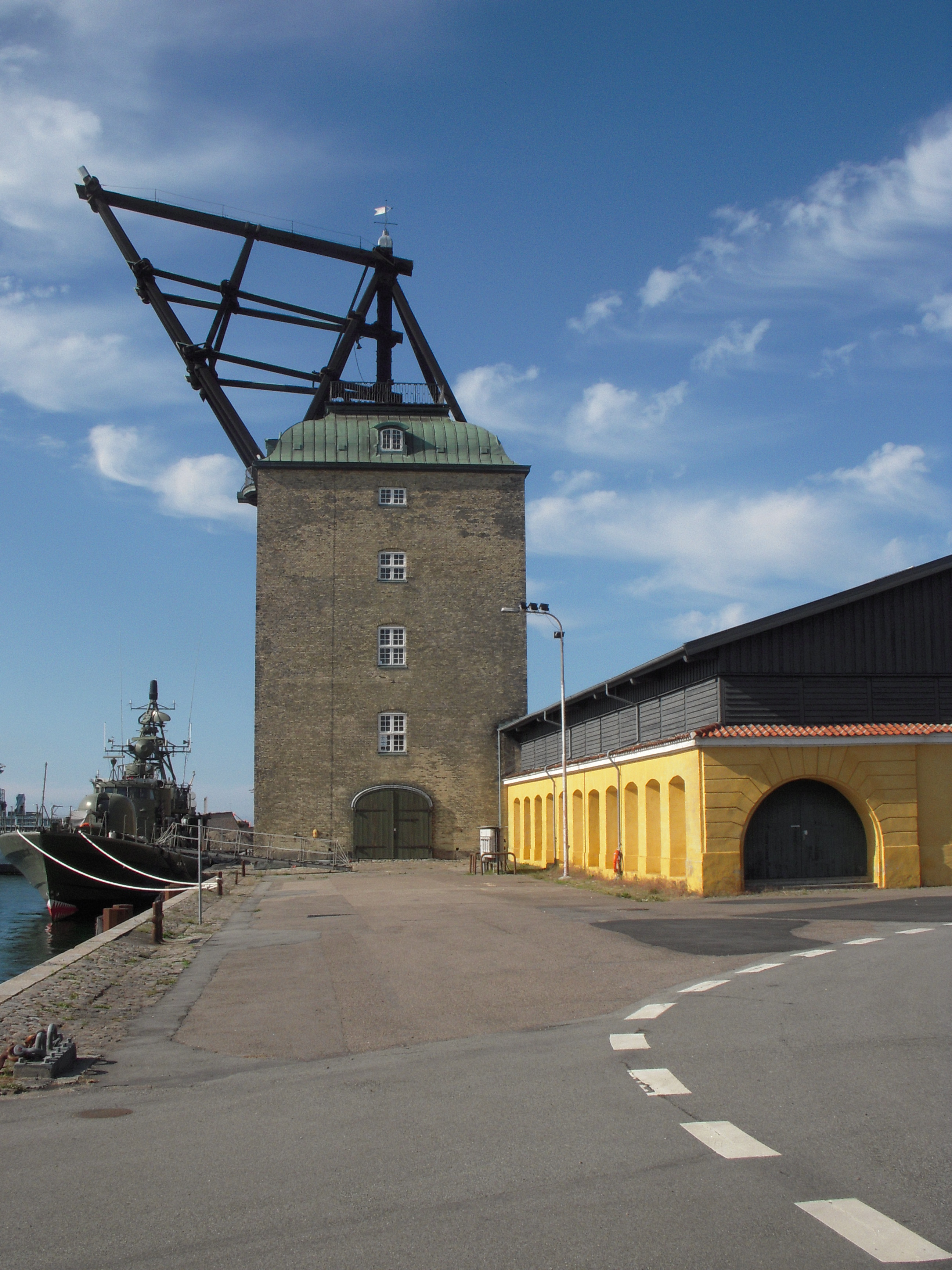 Mastekranen på Nyholm, Marinestation København. 30. maj 2011.